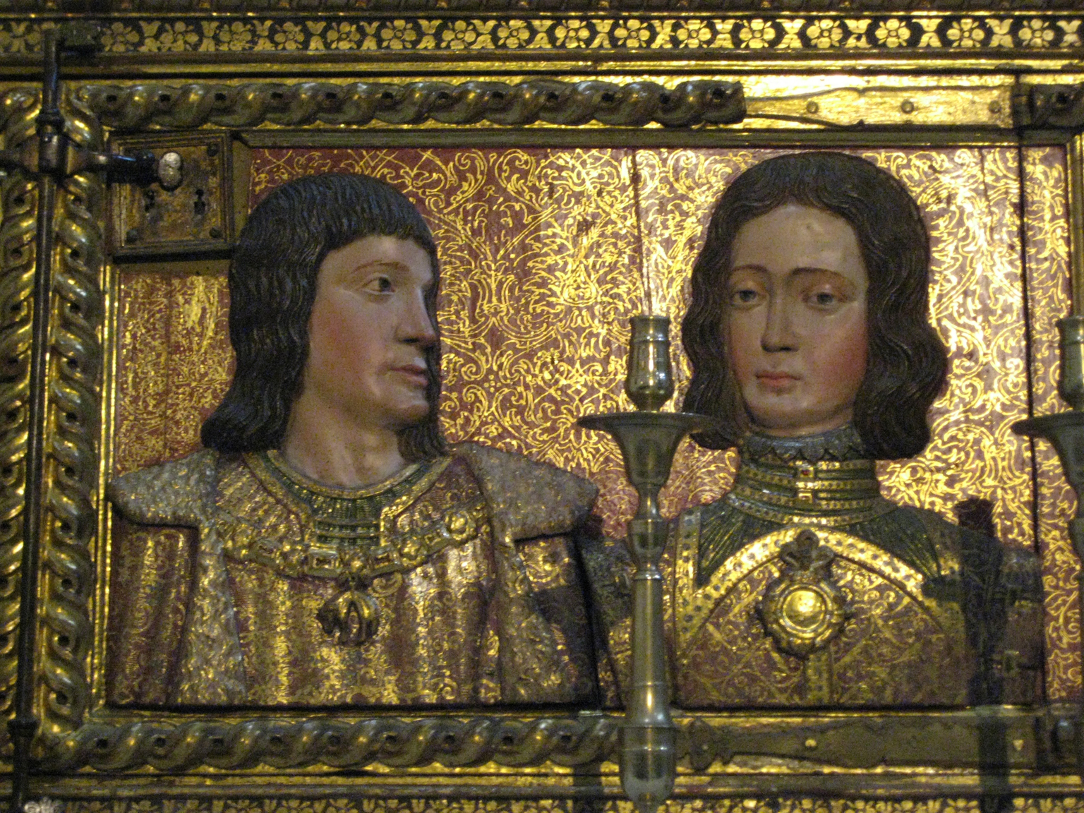 Reliquary altar, left. Sculptor Alonso de Mena 1632. Capilla Real, Granada. Panel with Juana la Loca and Felipe Hermoso